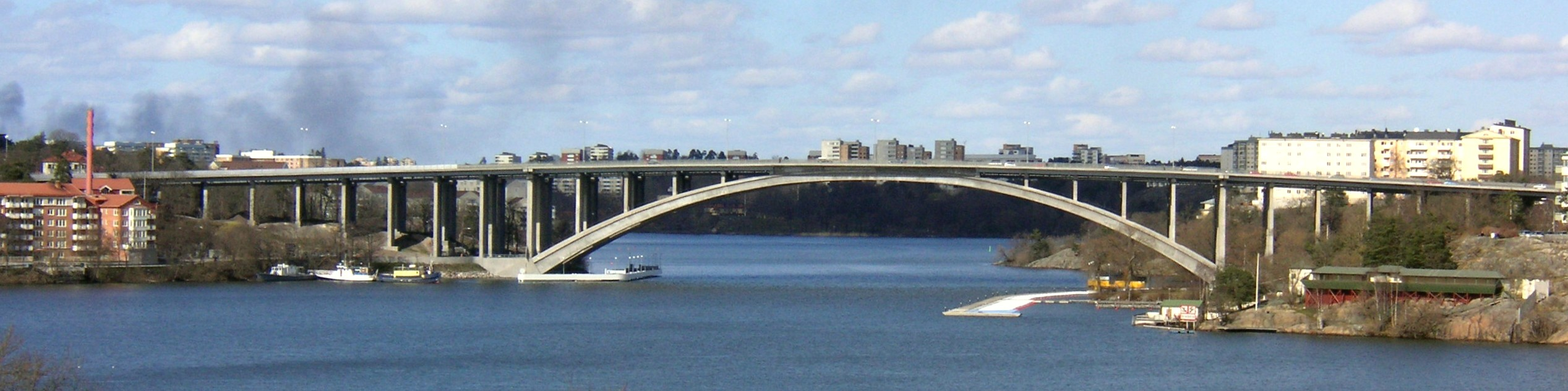 Tranebergsbron i Stockholm 2008